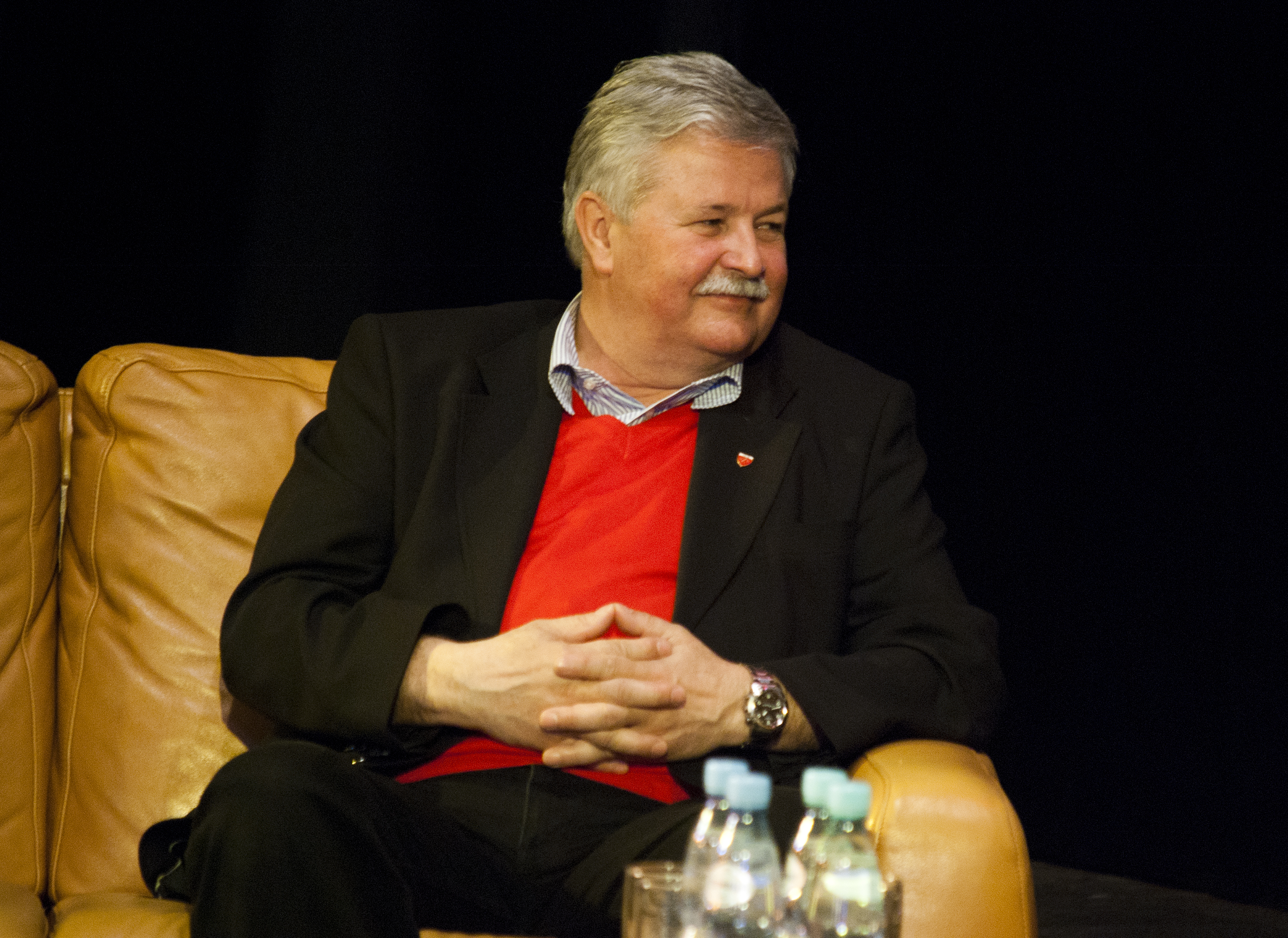 Apoloniusz Tajner w Centrum Kultury i Wypoczynku, Rynek 18, Proszowice.